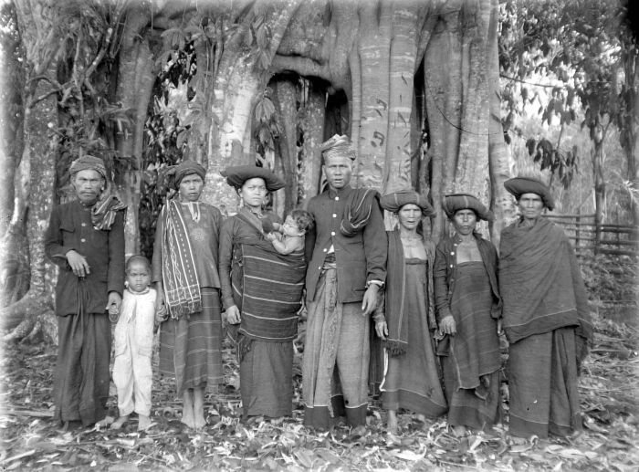 Negatief. Pa Sendi, Sibayak van Lingga, met zijn vrouw en andere familie, Sumatra